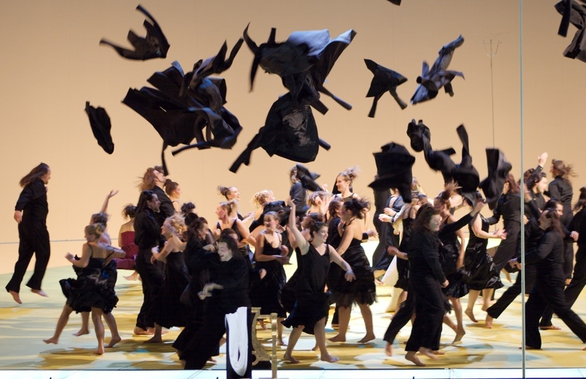 Der Salzburger Bachchor bei der Eröffnungspremiere für das "Haus für Mozart" - Salzburger Festspiele 2006 (Regie: Karl-Ernst und Ursel Hermann)